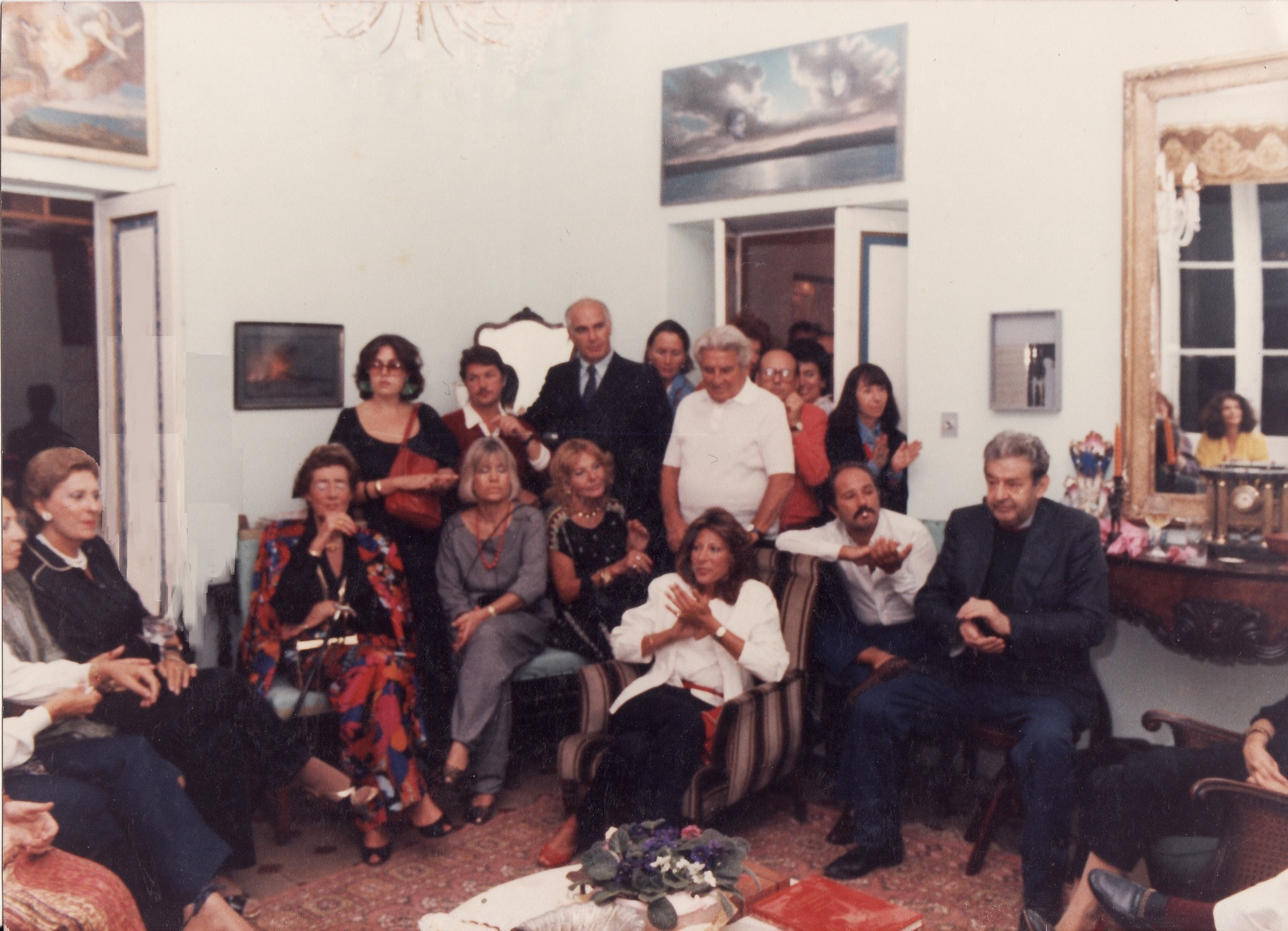 Serata a casa di Italo a Capri